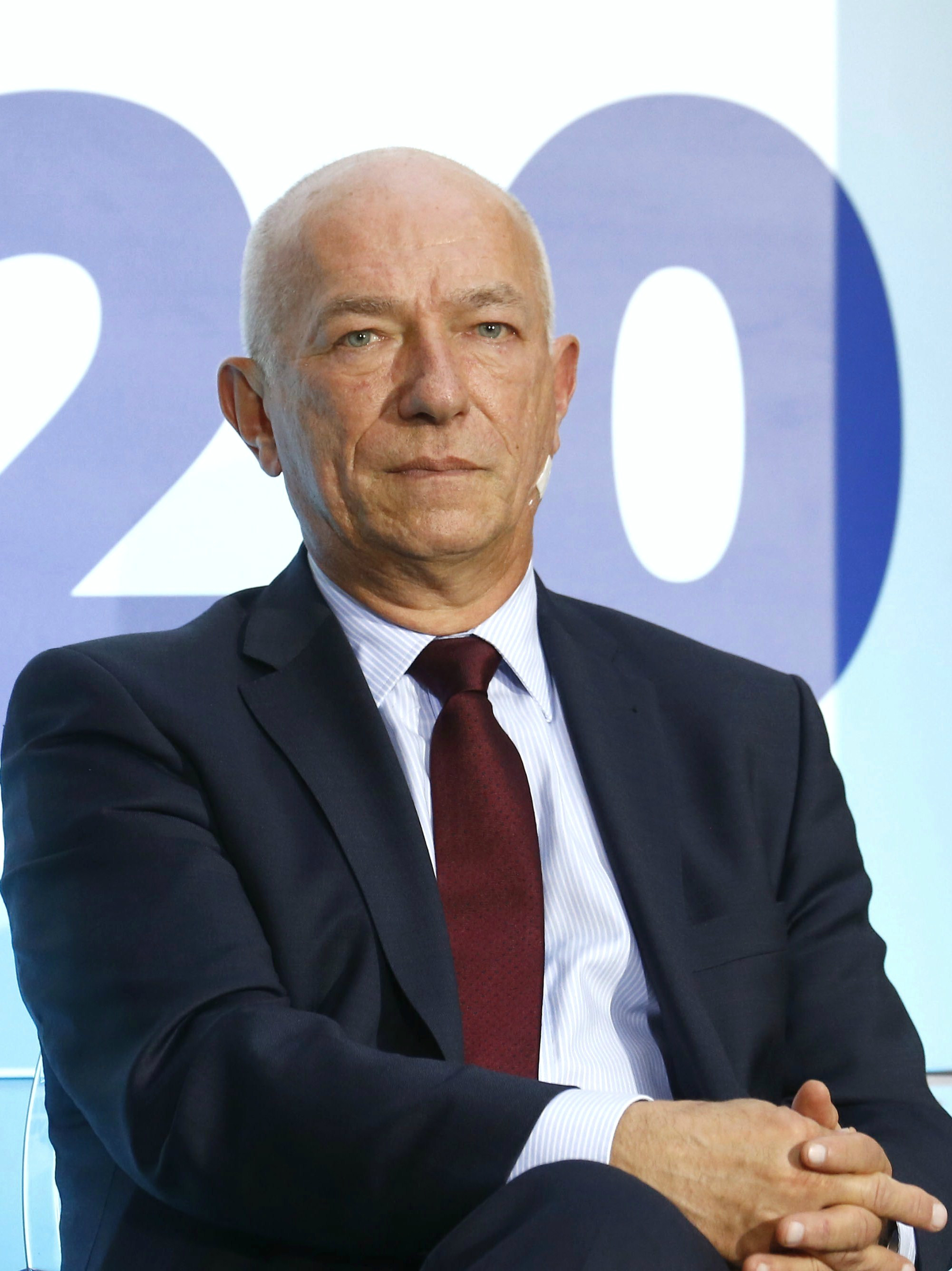 Zbigniew Ćwiąkalski, prawnik.